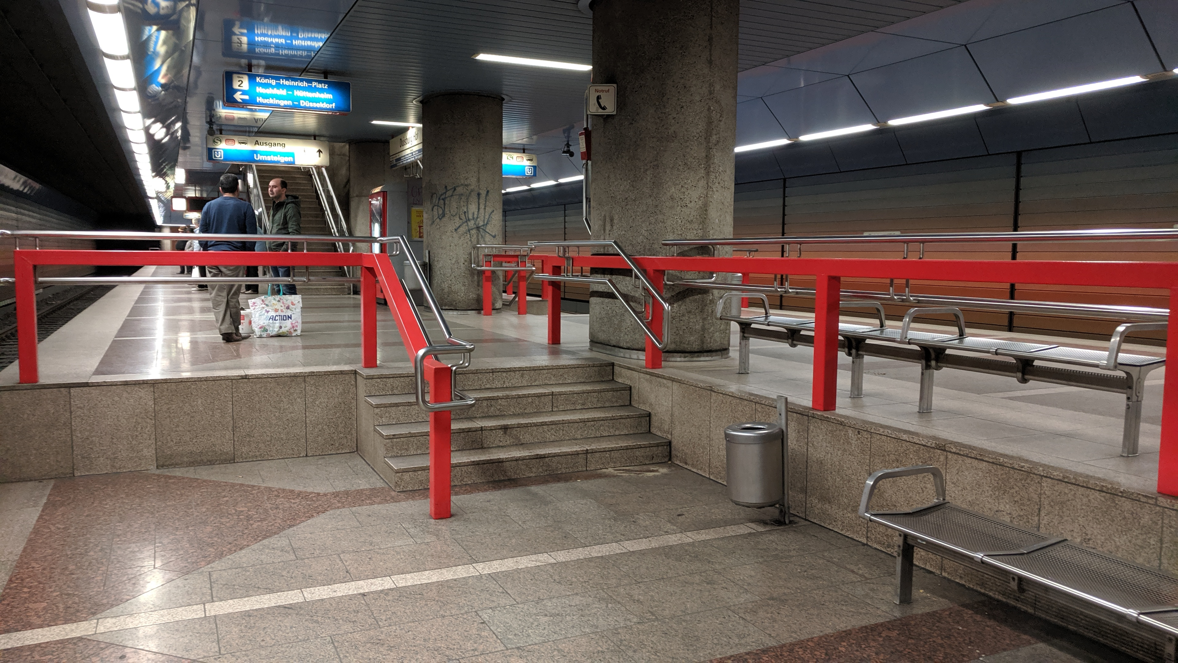 Stadtbahn Duisburg, Haltestelle: Duisburg Hauptbahnhof, Der Bahnsteig ist in zwei Teile mit unterschioedlichen Bahnsteighöhen geteilt, da hier vorne klassische Stzraßenbahnen halten, hinten die Stadtbahnzüge der Linie U79. Taken on 30 May 2019